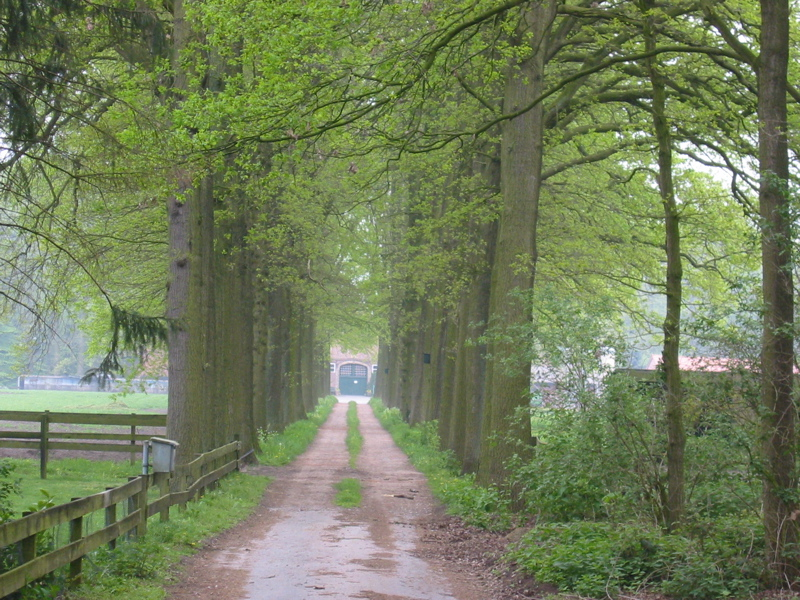 Allee der Auffahrt zum Hof Keller in Kölkebeck